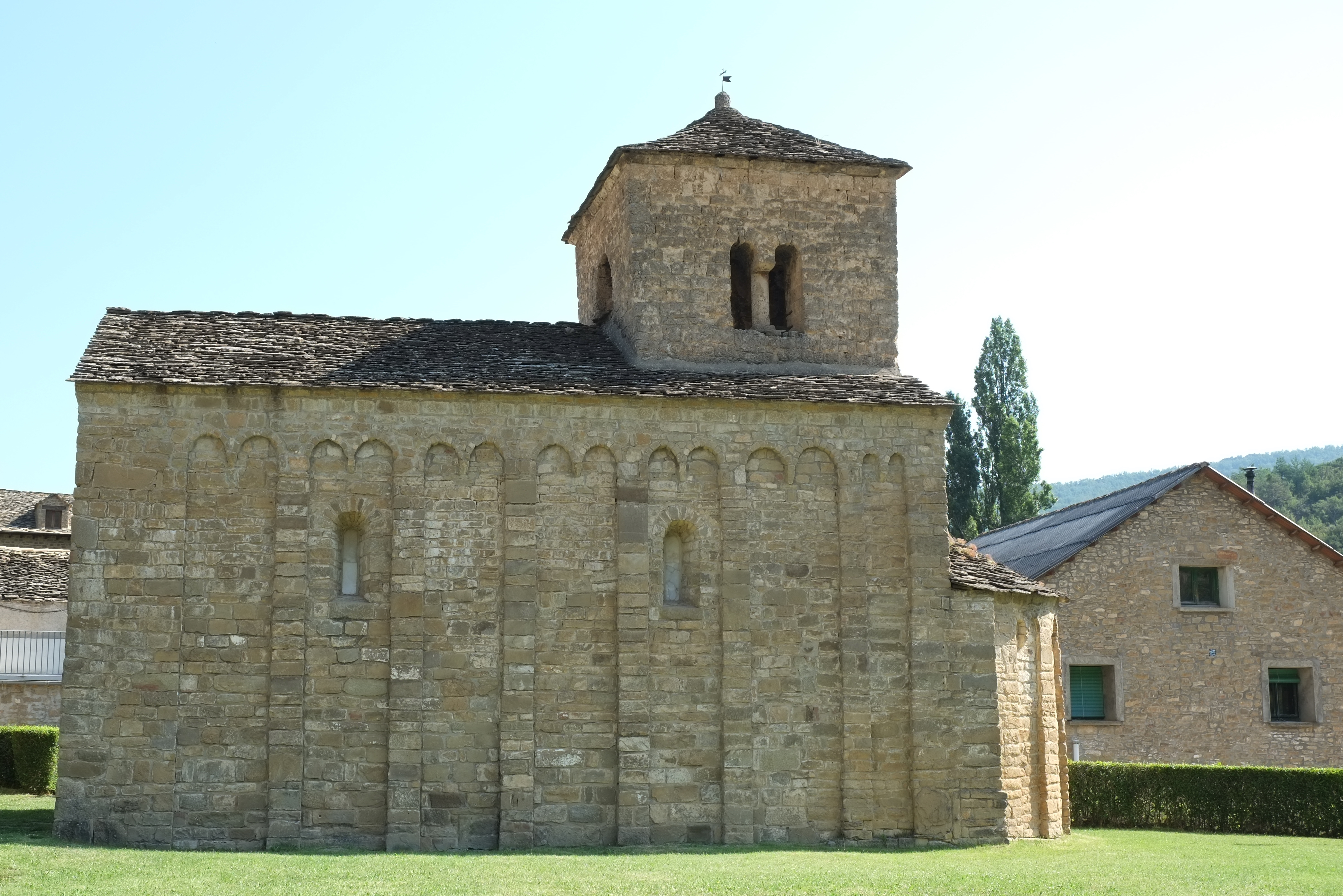 Kirche San Caprasio in Santa Cruz de la Serós in der spanischen Provinz Huesca in Aragonien